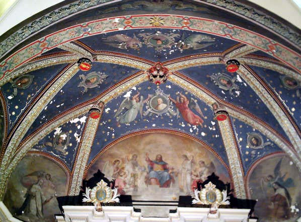 Décoration du sanctuaire de l'église d'Estagel par PAUTHE en 1867.